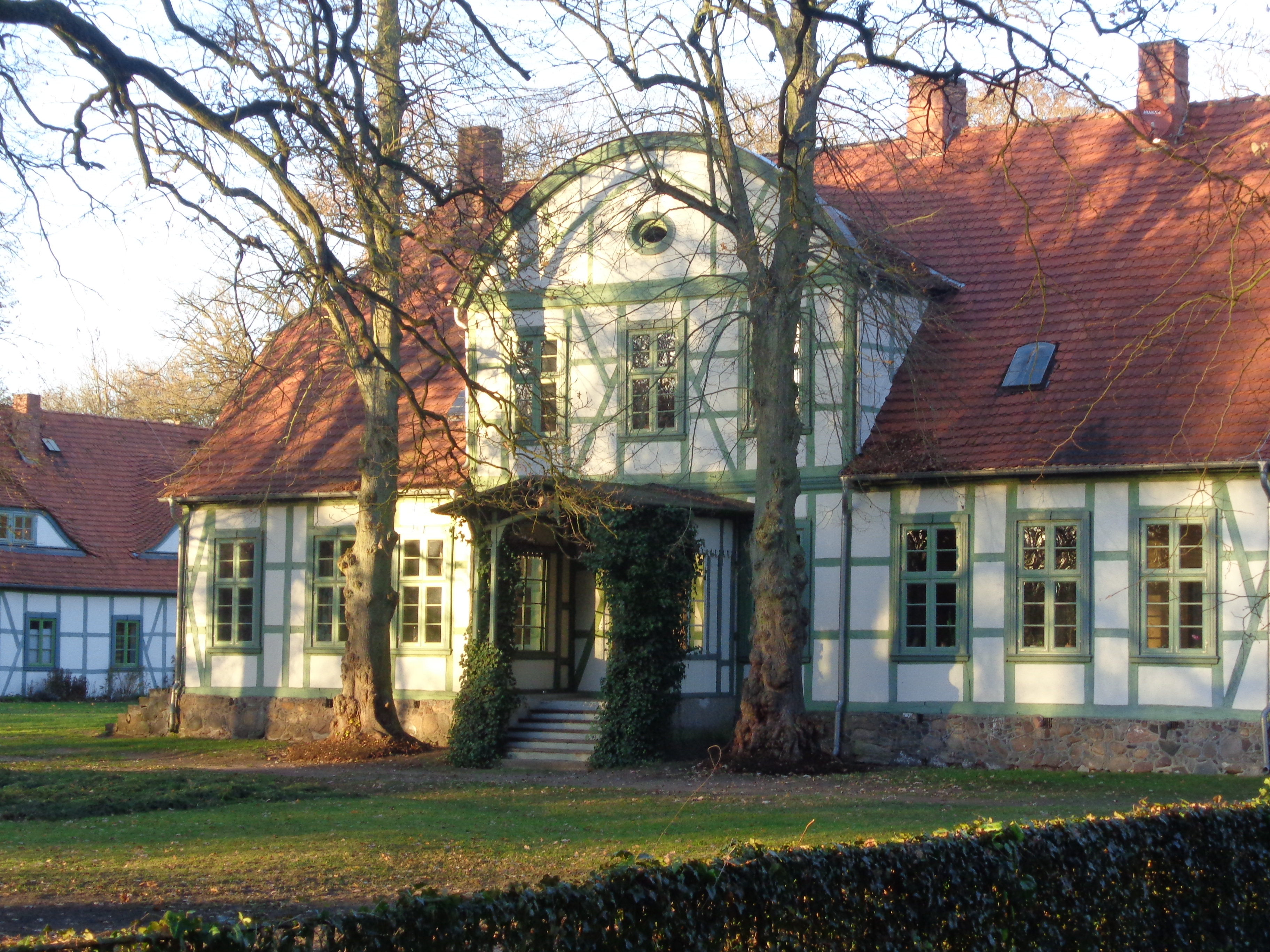 Südliche Seite des Jagdschlosses Friedrichsmoor